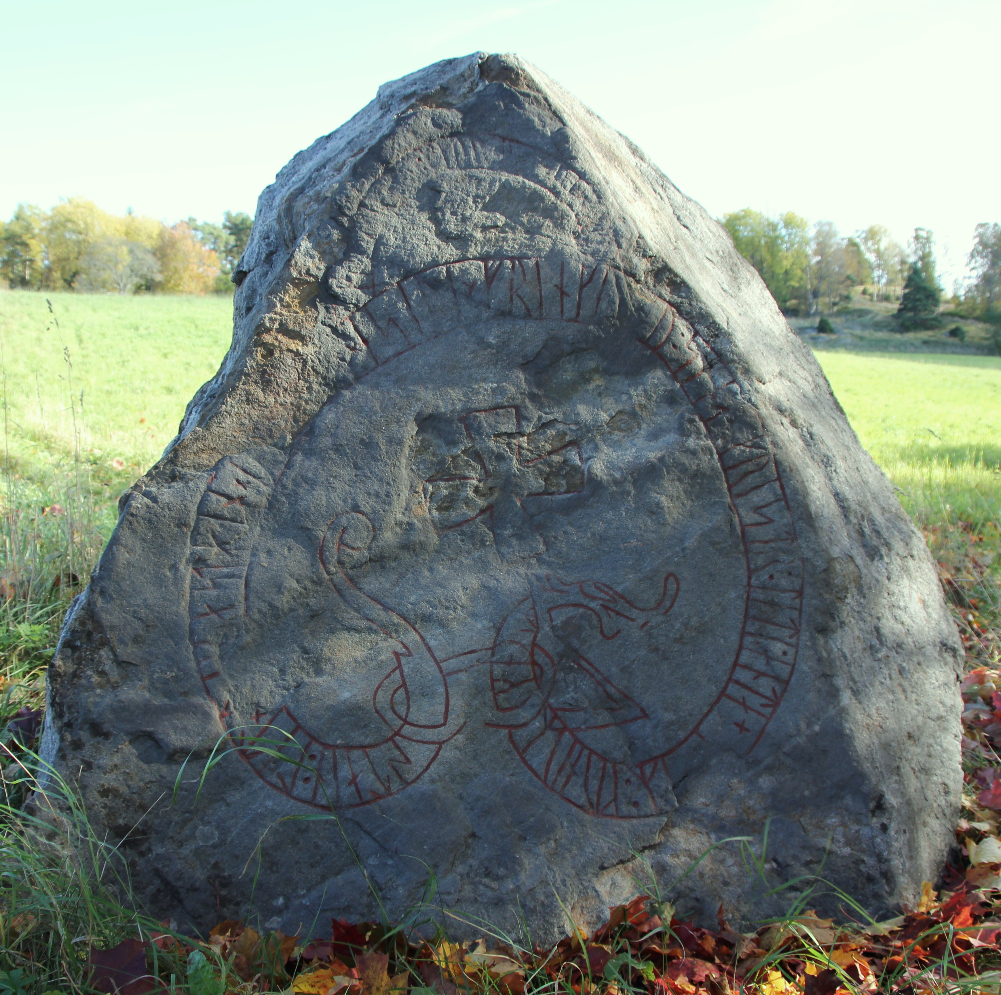 Runstenen Sö 139 vid Korpbron i Ludgo socken, Nyköping.